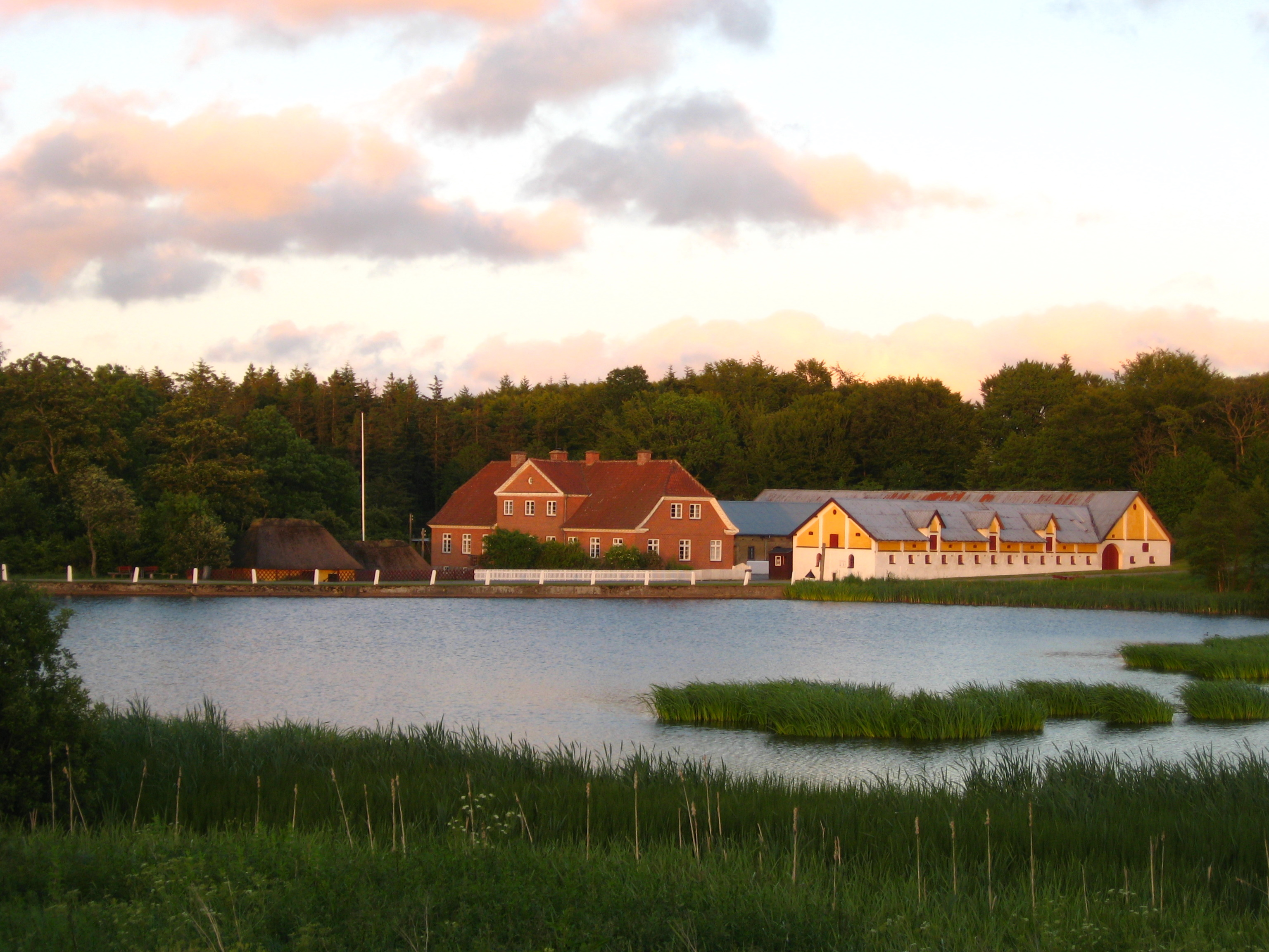 Dorf Møllegård